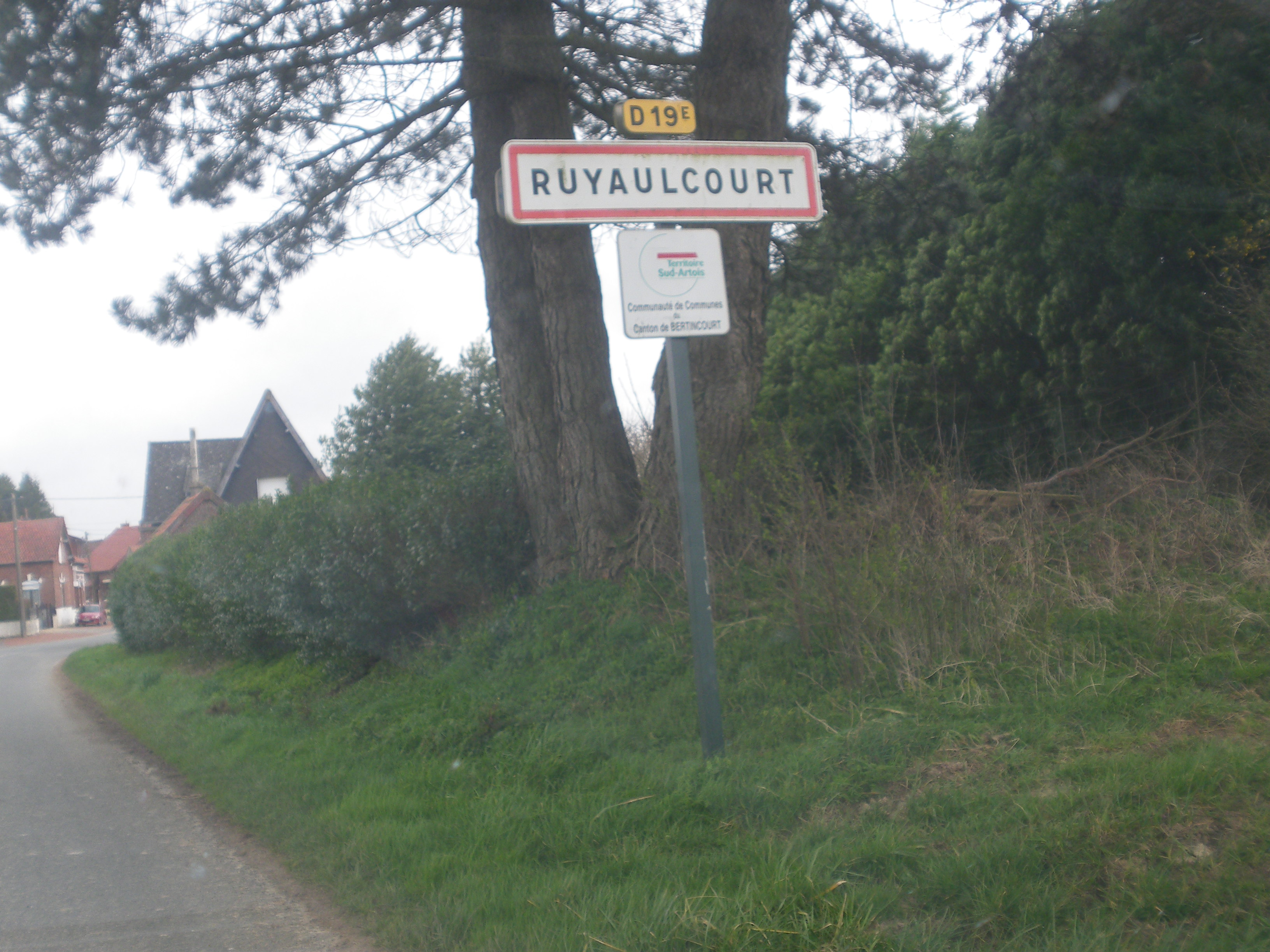 Une entrée de la commune de Ruyaulcourt.